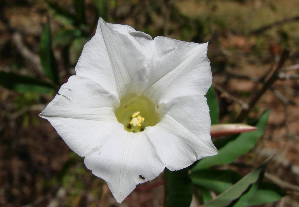 Merremia macrocalyx - CONVOLVULACEAE Parque Olhos D'Água - Brasília - Distrito Federal - Brasil.